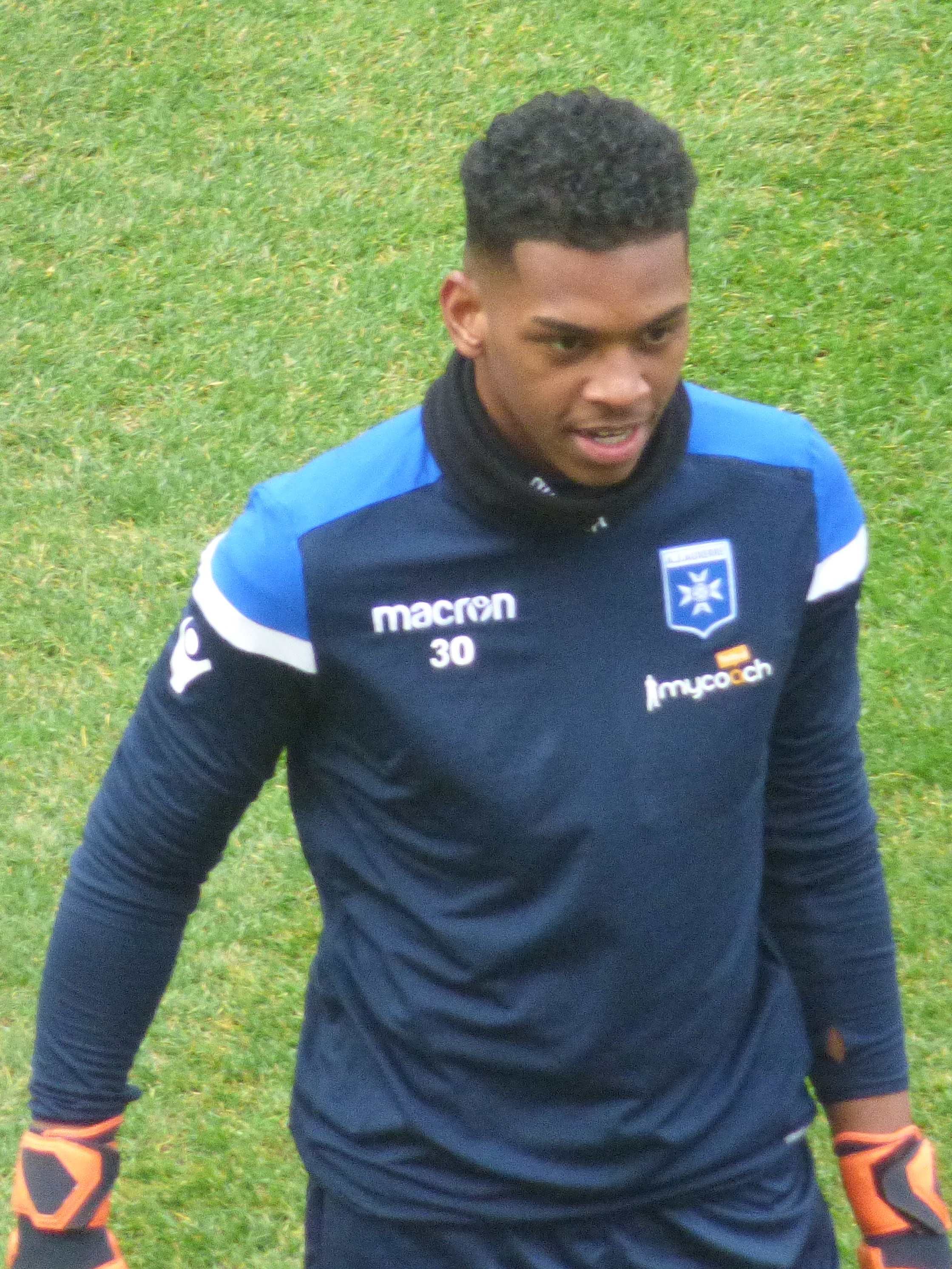 Sonny Laiton avant le match RC Lens - AJ Auxerre, comptant pour la 28ème journée du championnat de France de football de Ligue 2 2018-2019, le 9 mars 2019 au Stade Bollaert-Delelis.